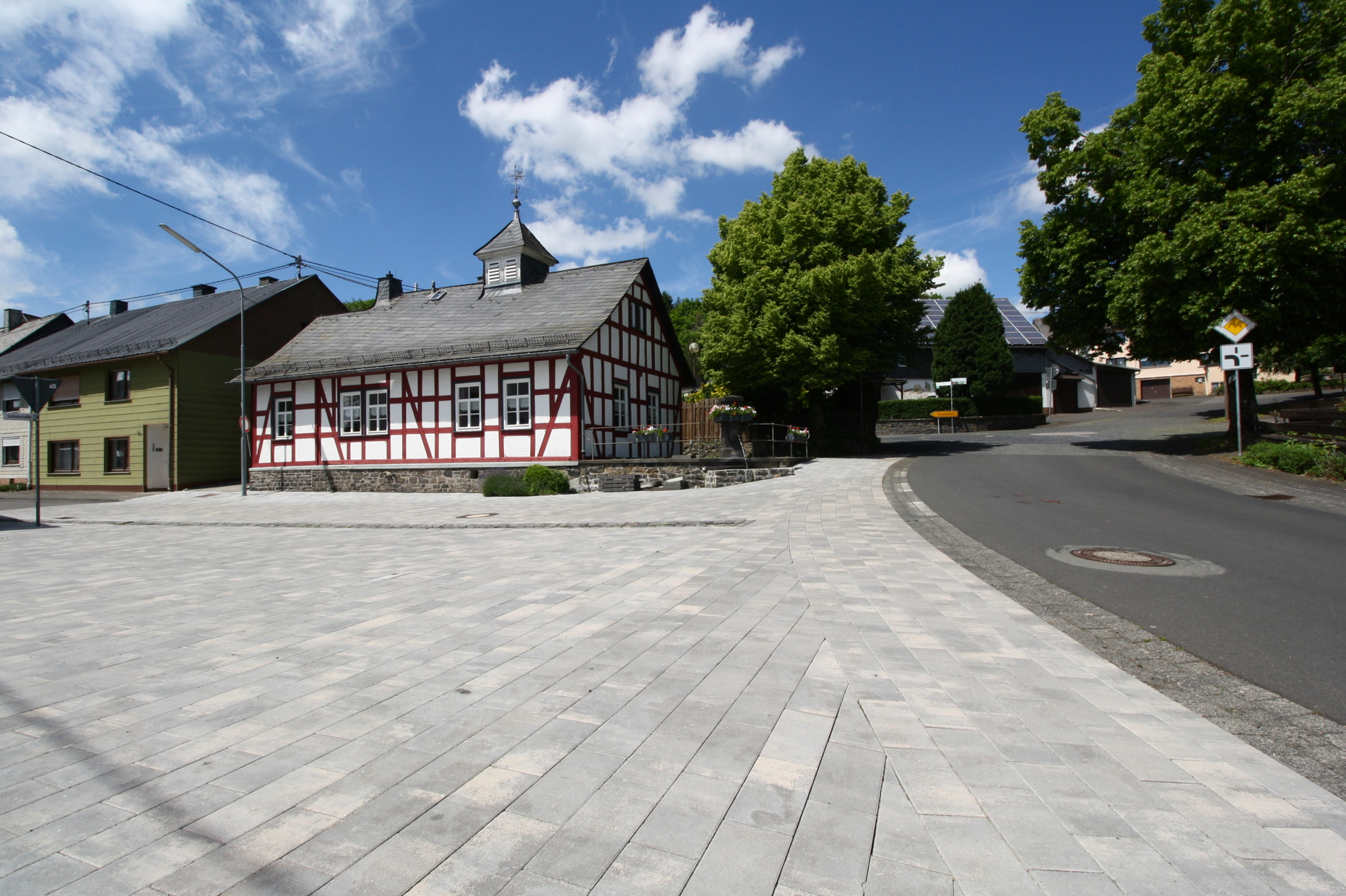 Homberg (Westerwald), Dorfgemeinschaftshaus (Alte Schule), Rheinland-Pfalz, Deutschland